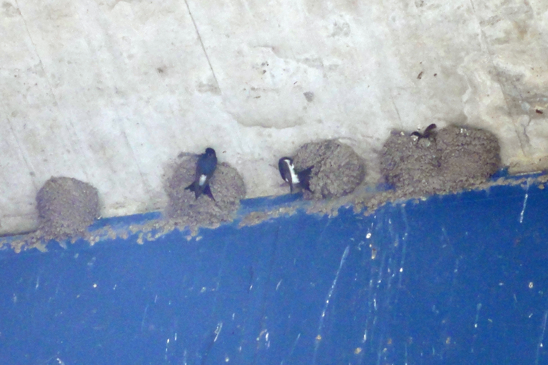 Zwaluwnesten in de Lage Knarsluis in de Knardijk bij Lelystad